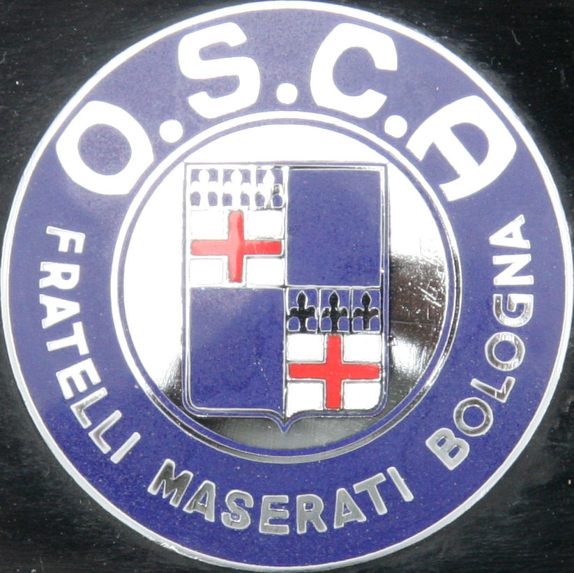 Officine Specializate Costruzione Automobili